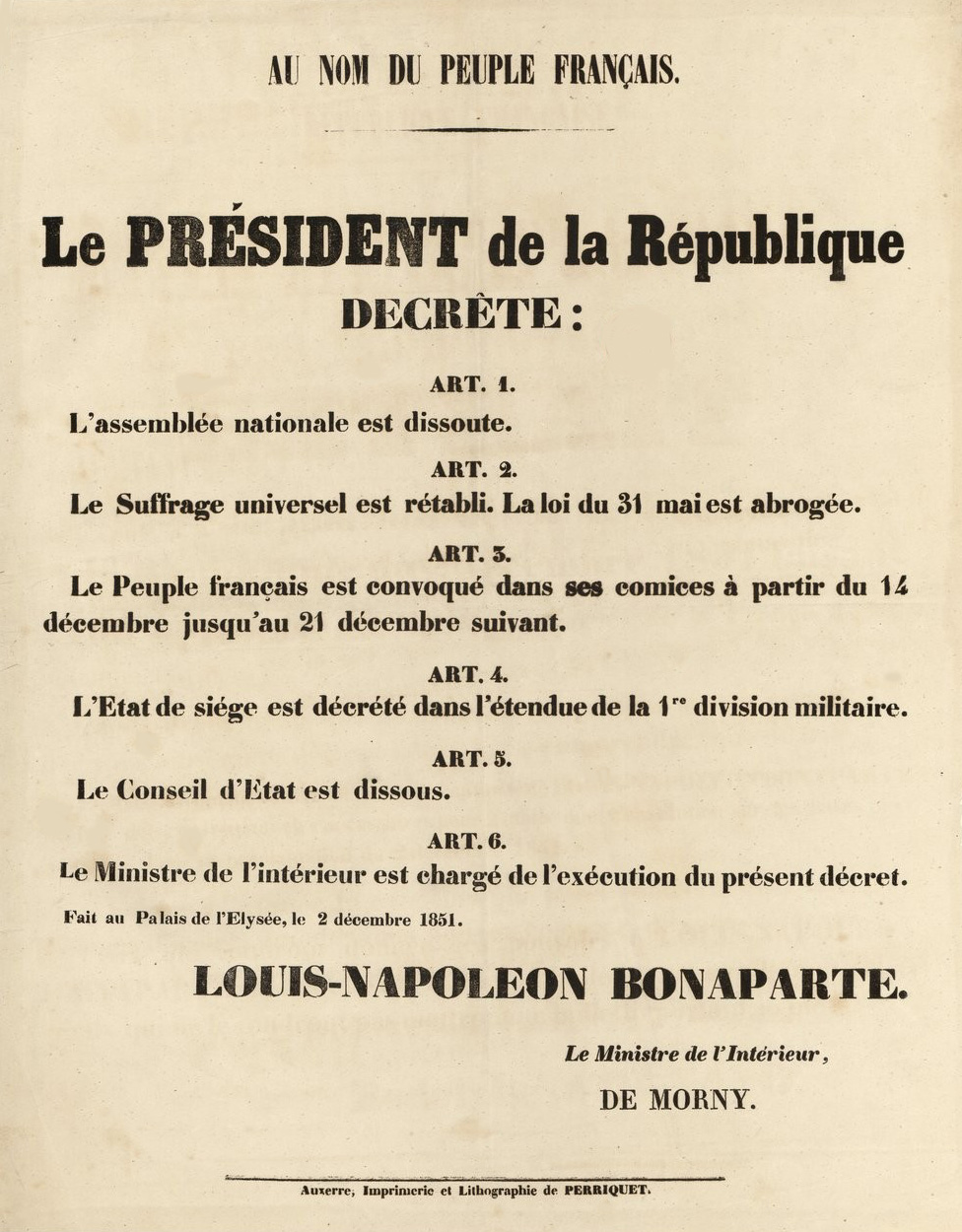 Proclamation Au nom du peuple français placardée sur les murs de Paris durant le coup d'État du 2 décembre 1851. Nicole Villa, Denise Dommel et Jacques Thirion, Collection De Vinck : inventaire analytique. Un siècle d'histoire de France par l'estampe, 1770-1871, tome 7 : La Révolution de 1848 et la Deuxième République, Bibliothèque nationale, Département des estampes, 1955, p. 772, lire en ligne.